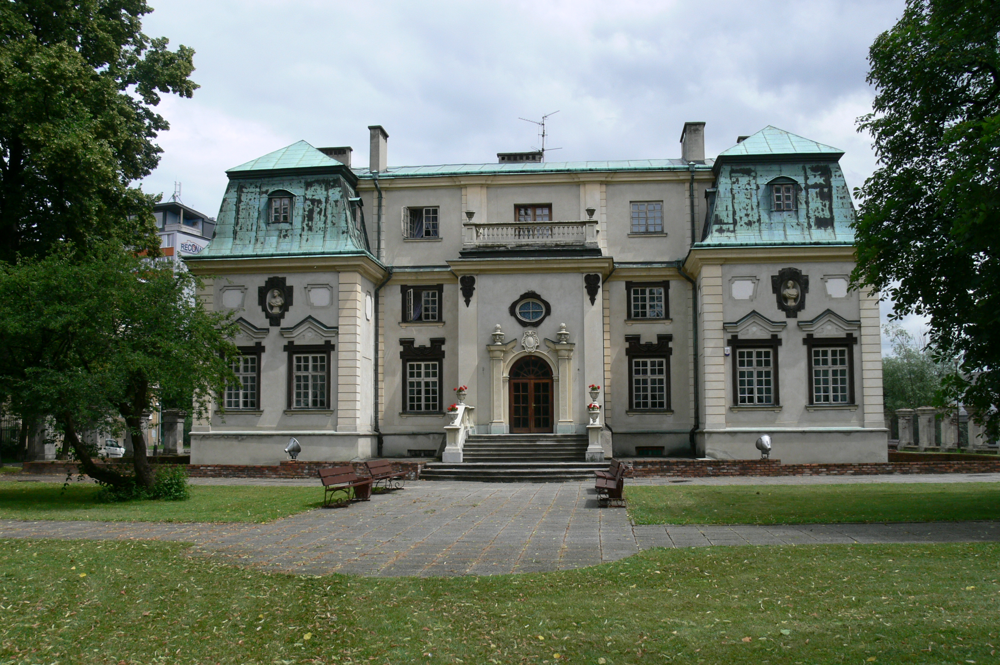 Zespół pałacowy, letni pałac Lubomirskich wraz z ogrodem i kordegardą w Rzeszowie A – 292, z dn. 31.05.68 -Magkrys